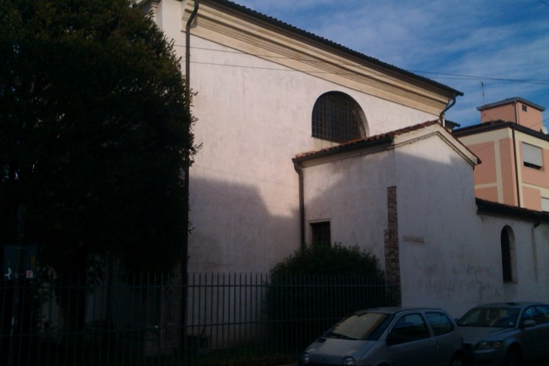 Chiesa di San Massimo a Padova